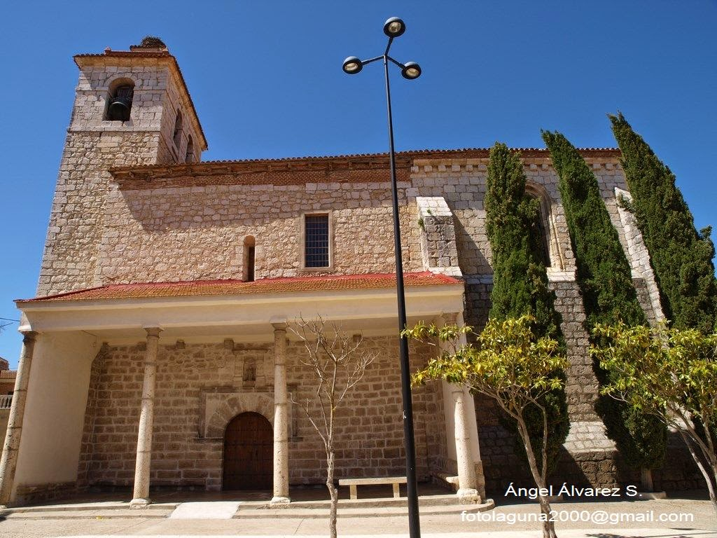 Geria